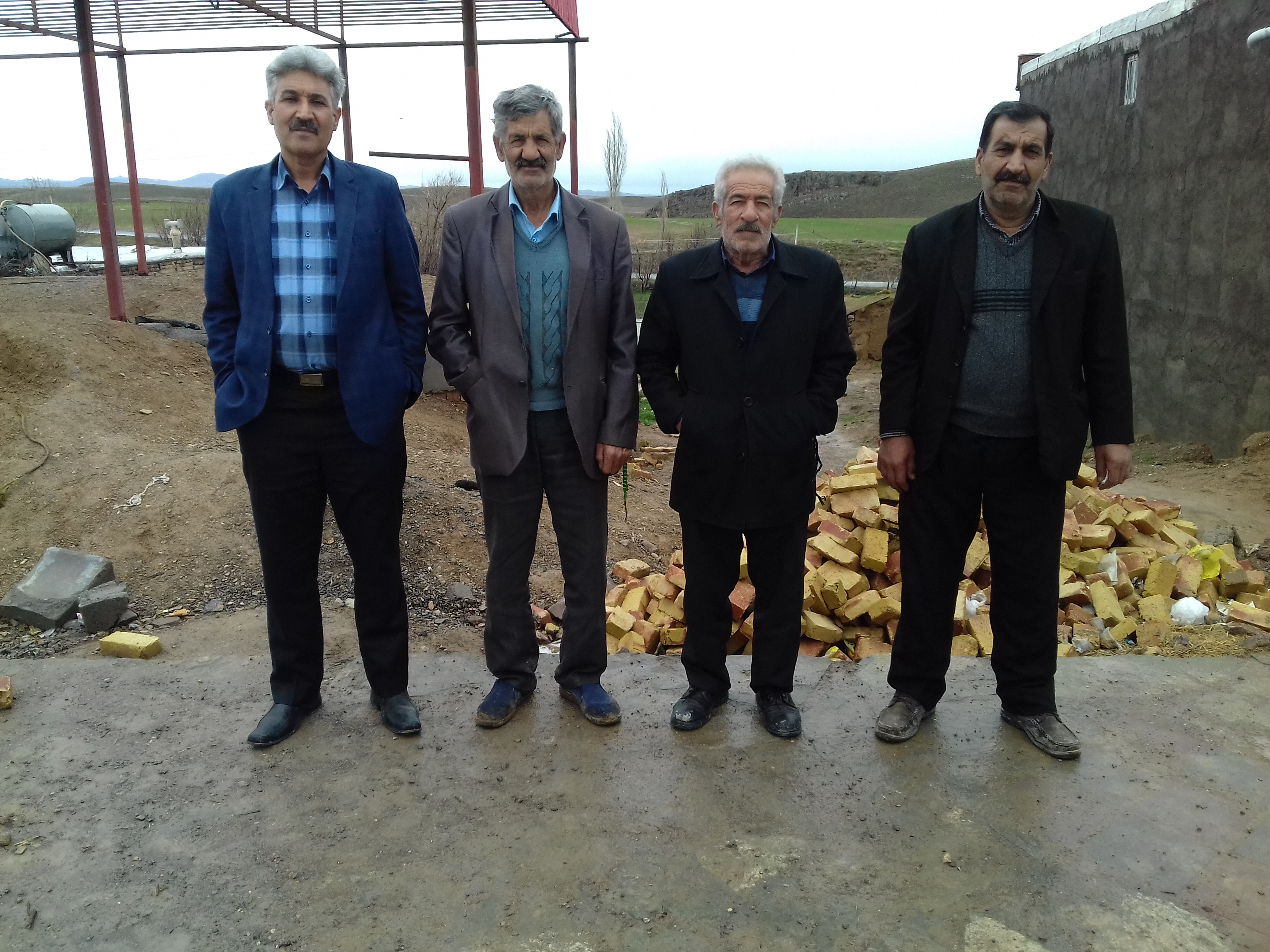 اهالی خونگرم روستا